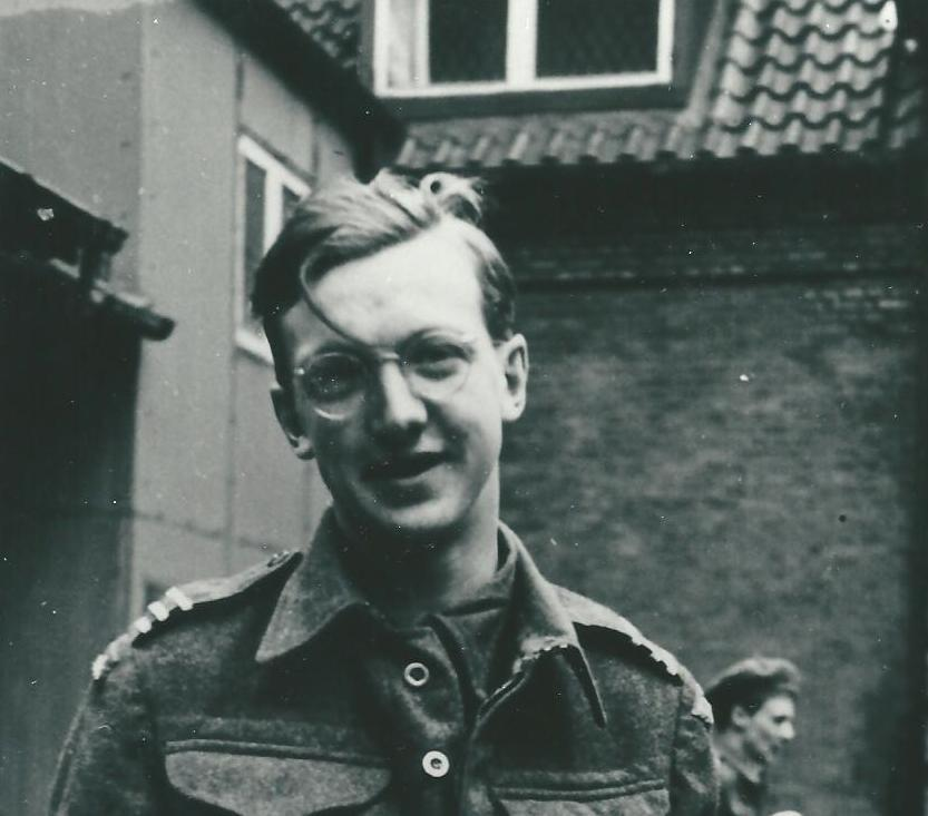 Jørgen Jespersen (1926-2003), Danish resistance member (BOPA)